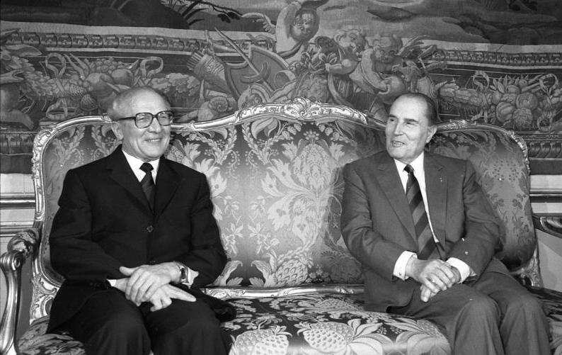 ADN-ZB Mittelstädt 8.1.1988 Frankreich: Honecker-Besuch Der Präsident der Französischen Republik, Francois Mitterand, empfing den zu einem Staatsbesuch in Paris weilenden Generalsekretär des ZK der SED und Vorsitzenden des Staatsrates der DDR, Erich Honecker, im Elysée-Palast zum Abschlußgespräch.